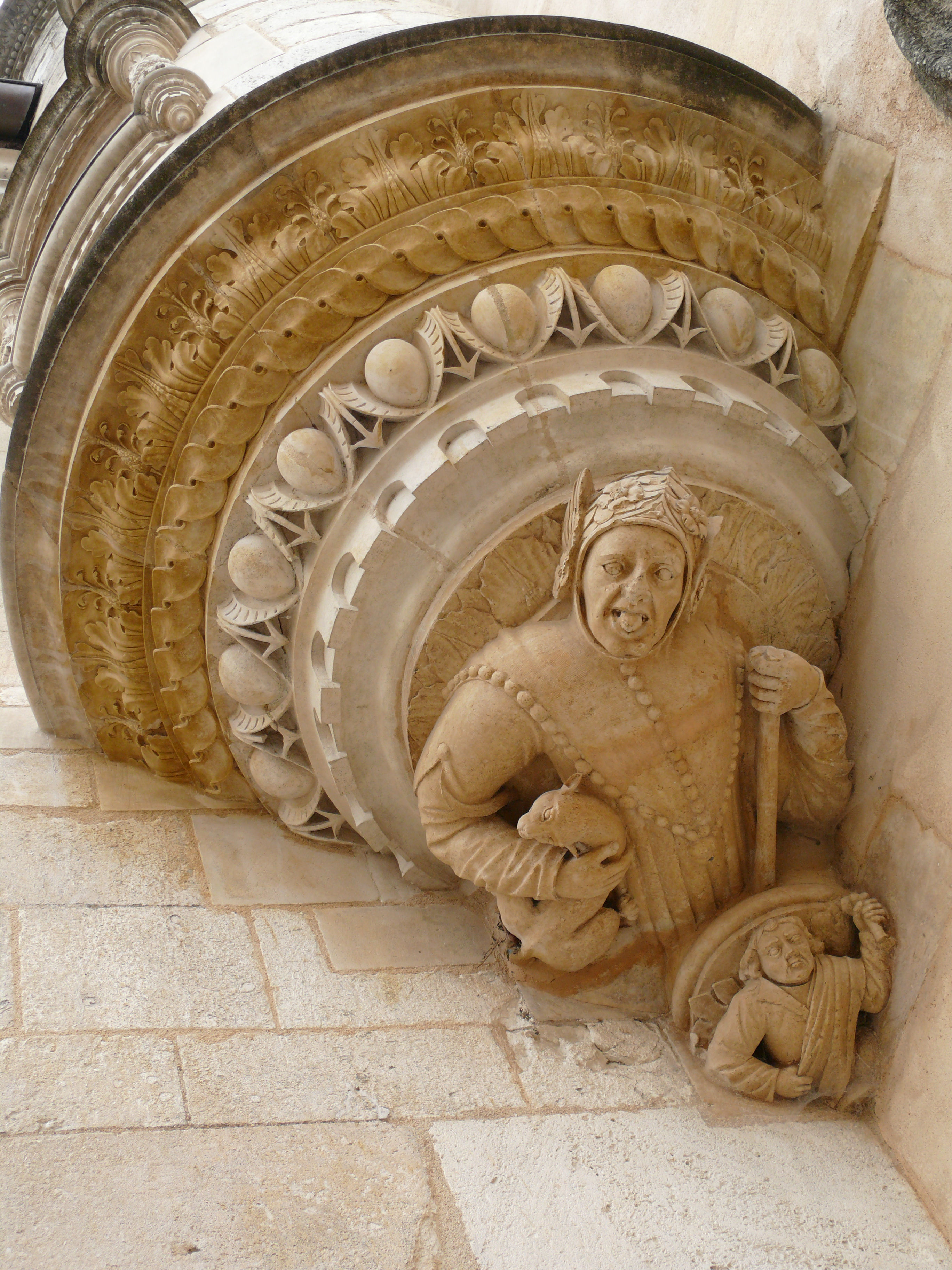 Bourges - Hôtel Lallemant - Façade sur cour - Détail de la tourelle